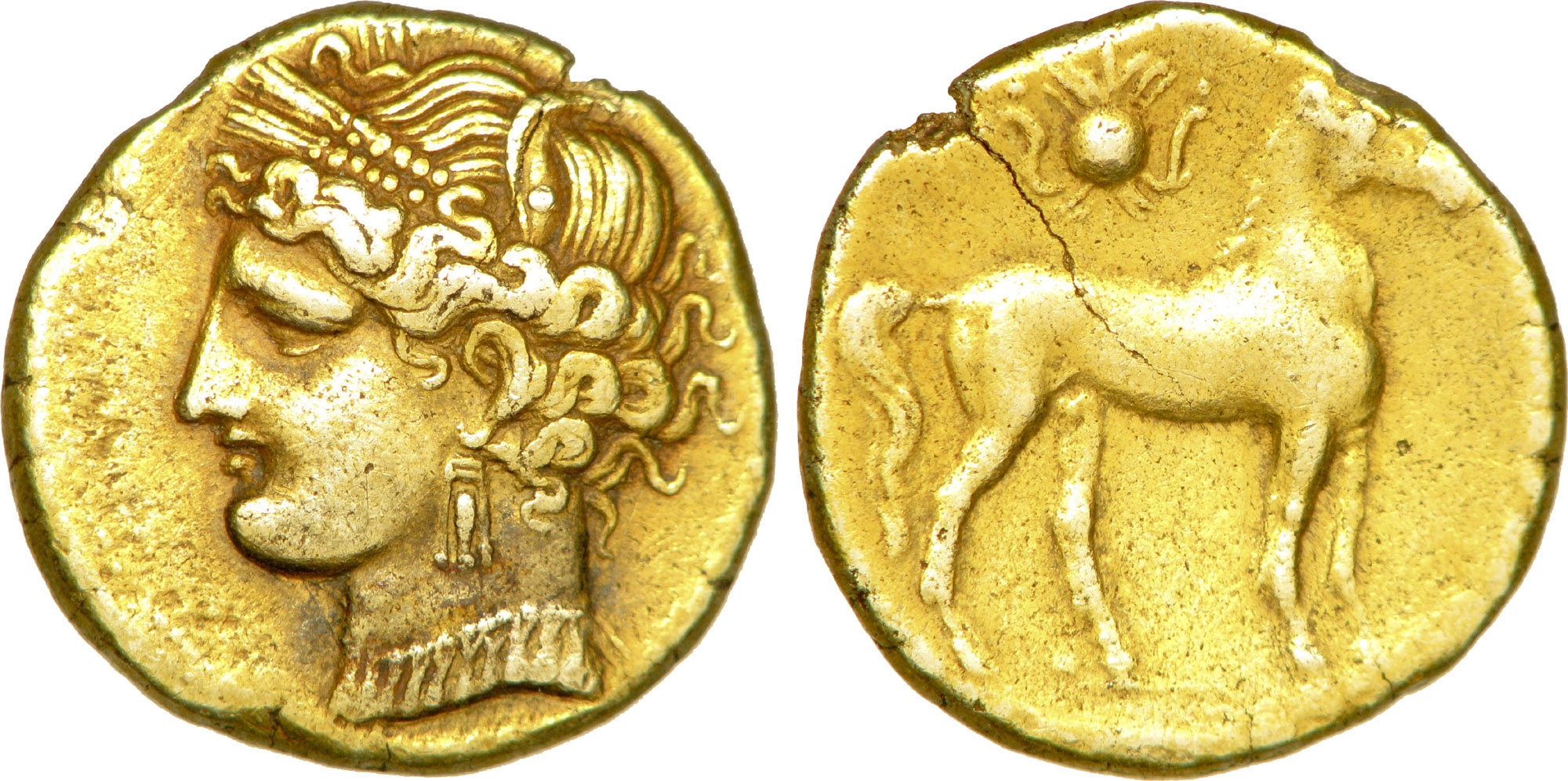 Nom de l'atelier : Zeugitane, Carthage Métal : électrum Titre en millième : 350‰ Diamètre : 22,5mm Axe des coins : 12h. Poids : 10,51g. Titulature avers : Anépigraphe. Description avers : Tête de Tanit à gauche, couronnée d’épis avec collier et boucles d’oreille. Titulature revers : Anépigraphe. Description revers : Cheval debout à droite ; au-dessus, un disque solaire avec l’uraeus.